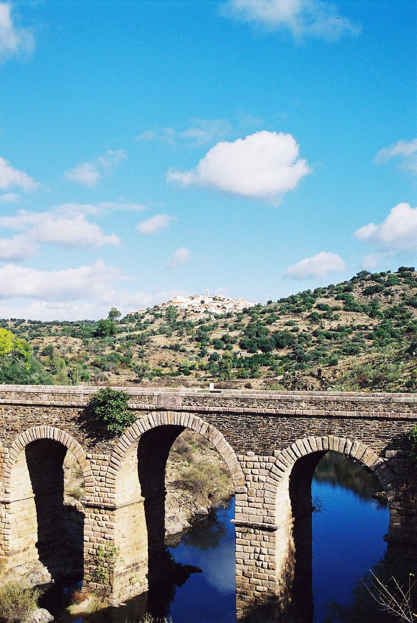 Segura's bridge.